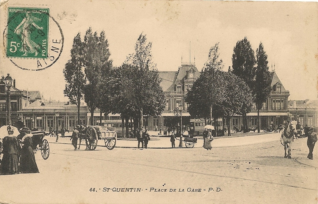 La gare de Saint-Quentin en 1911.